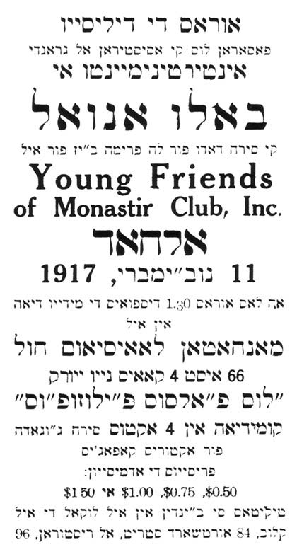 Обява на битолския еврейски клуб